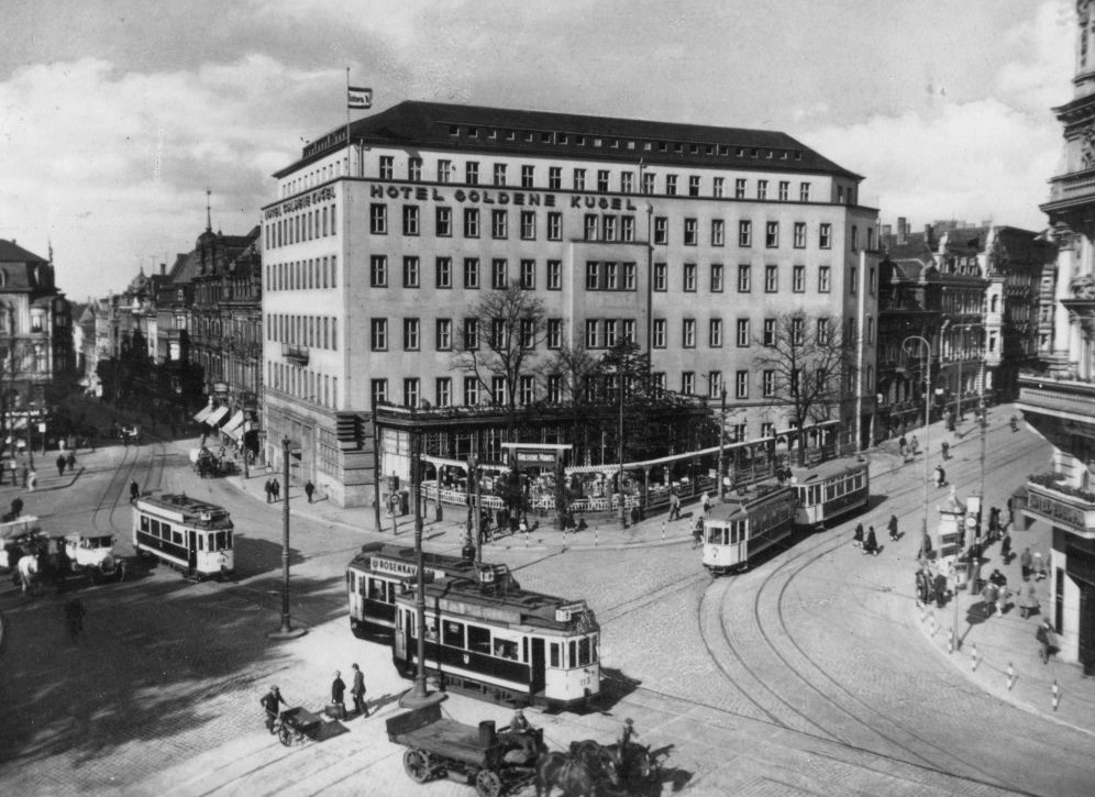 Halle, Riebeckplatz, Hotel Goldene Kugel, Architekt: Hermann Frede